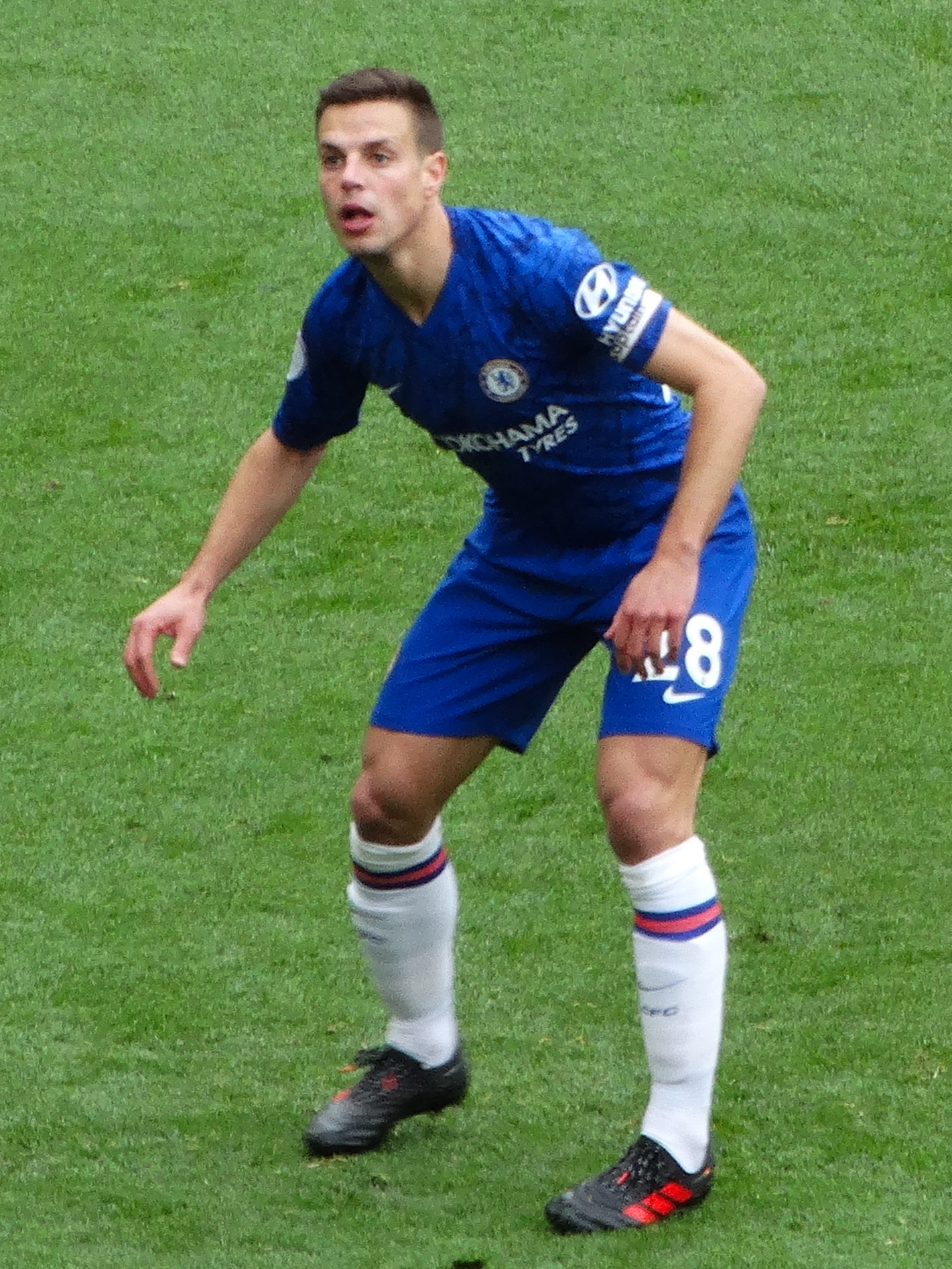 Cesar Azpilicueta